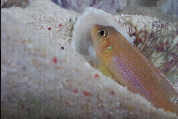 바닥공사를 하다가 앉아(?)있는 암컷